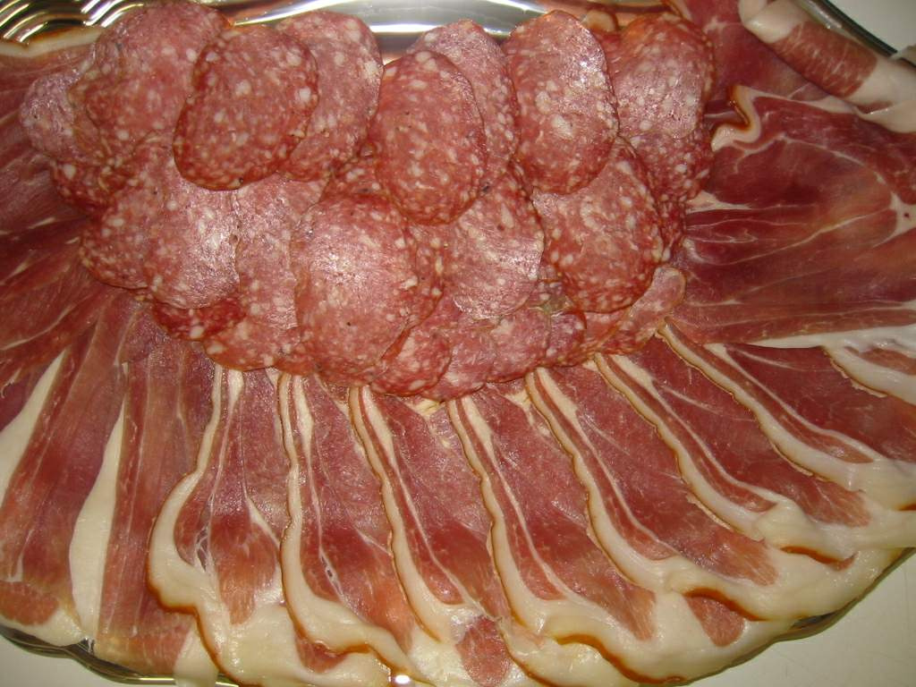 Salaison de montagne, Noël Thaurin, Moutaine, Jura, France